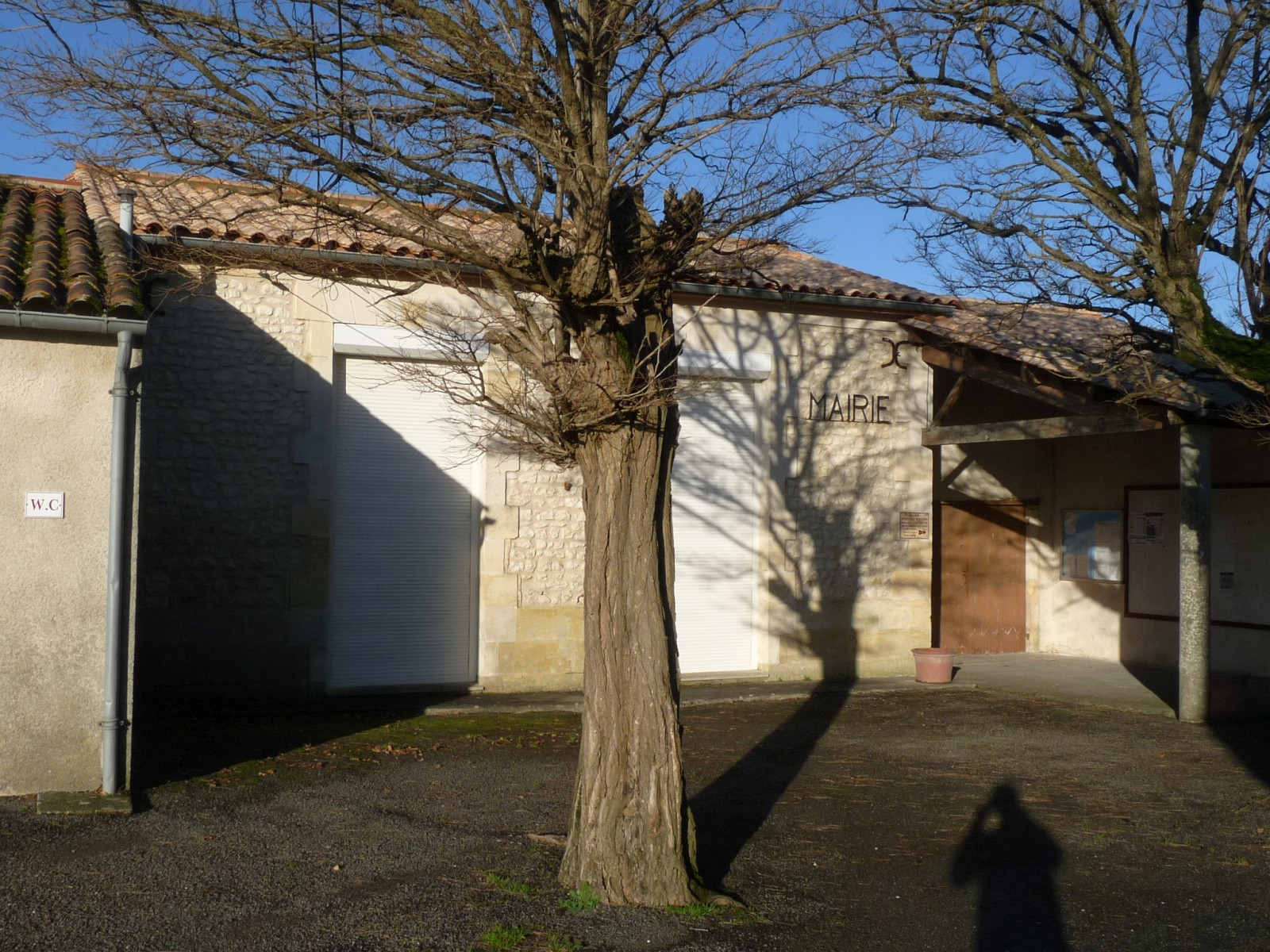 Mairie de Pommiers-Moulons, Charente-Maritime, France